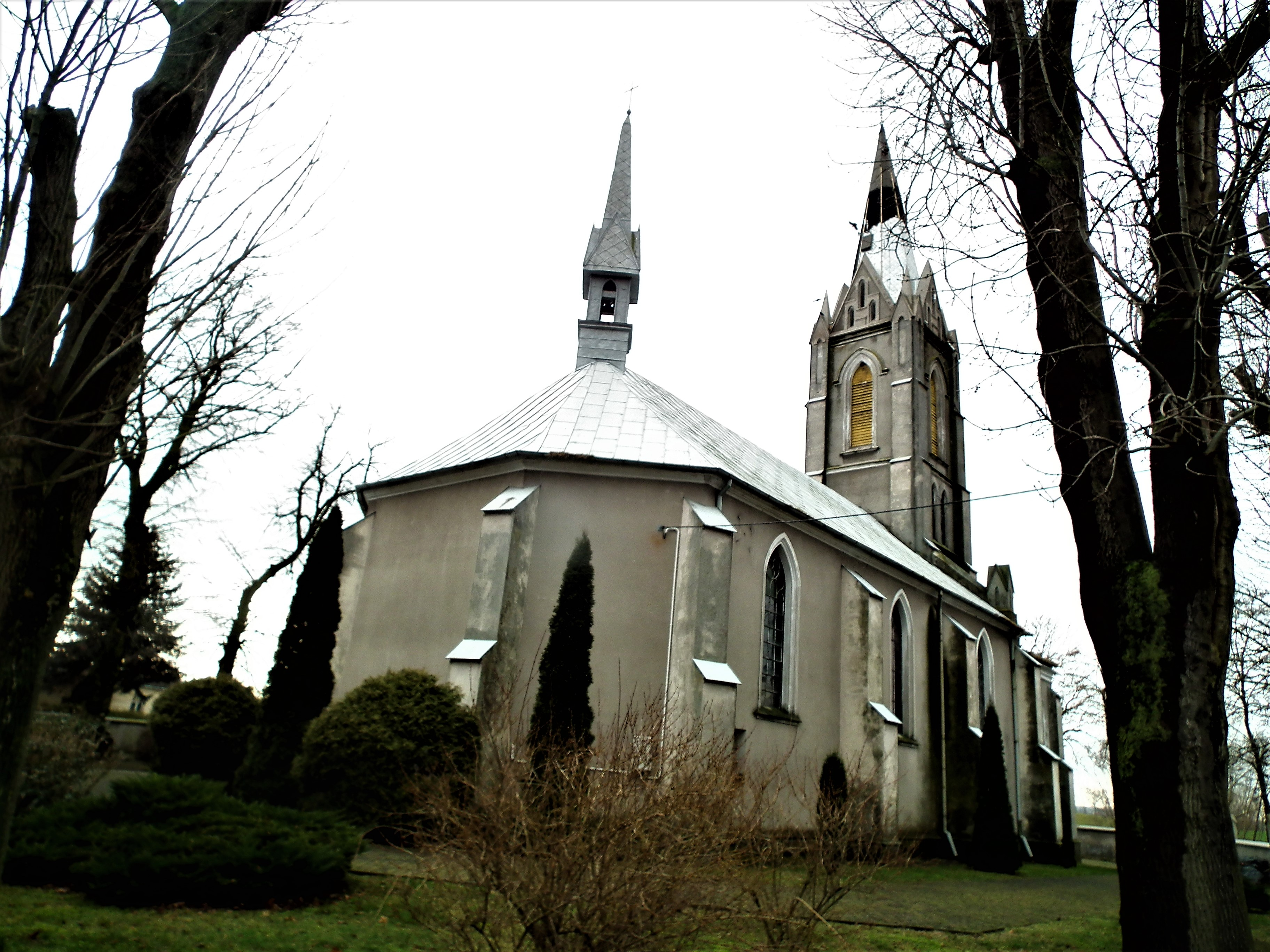 Kościół Świętej Trójcy w Połajewie (gm. Piotrków Kuj.).